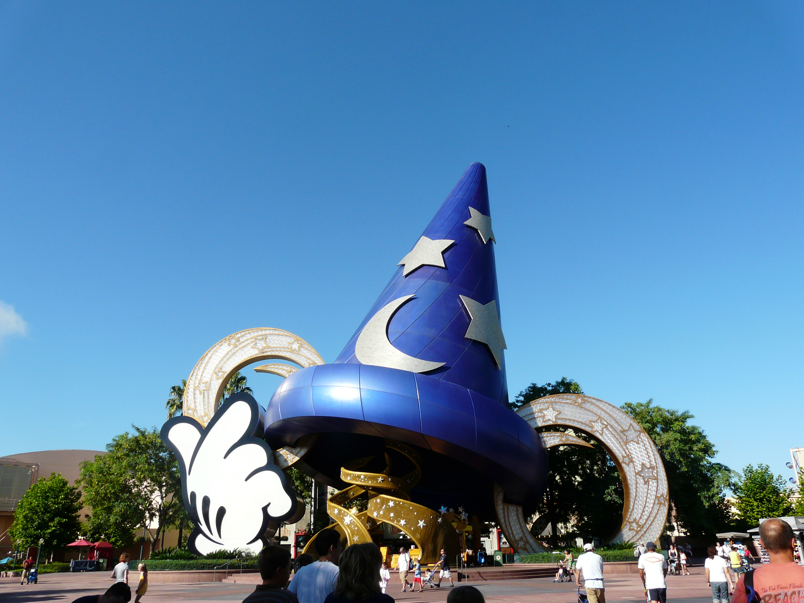 Der Zauberhut in Disney’s Hollywood Studios